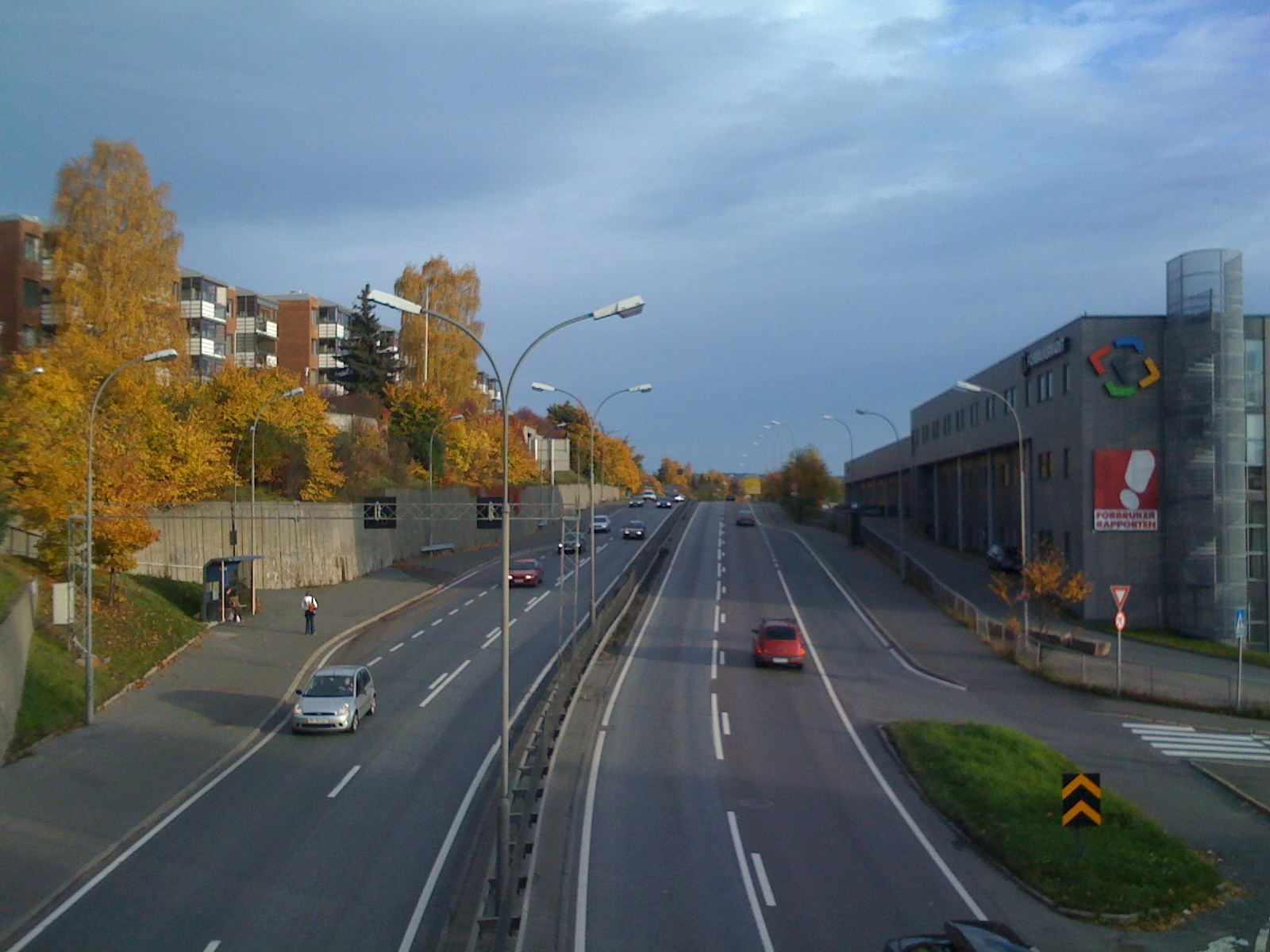 Rolf Wickstrøms vei som Ring 3 (Riksvei 150) utgjør grensen mellom Grefsen (venstre) og Nydalen (høyre).